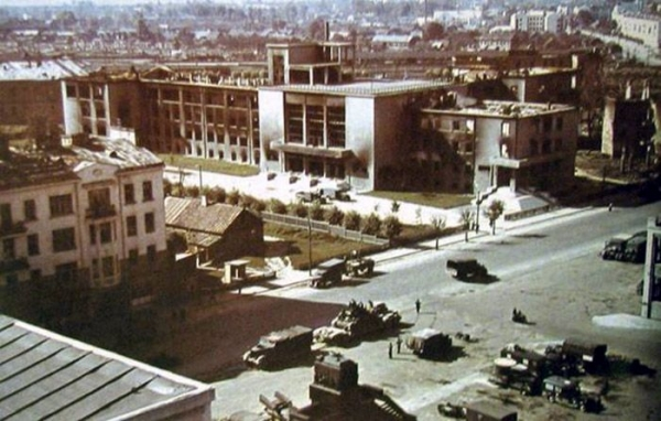 БДУ. Галоўны корпус БДУ з даху Дома ўрада